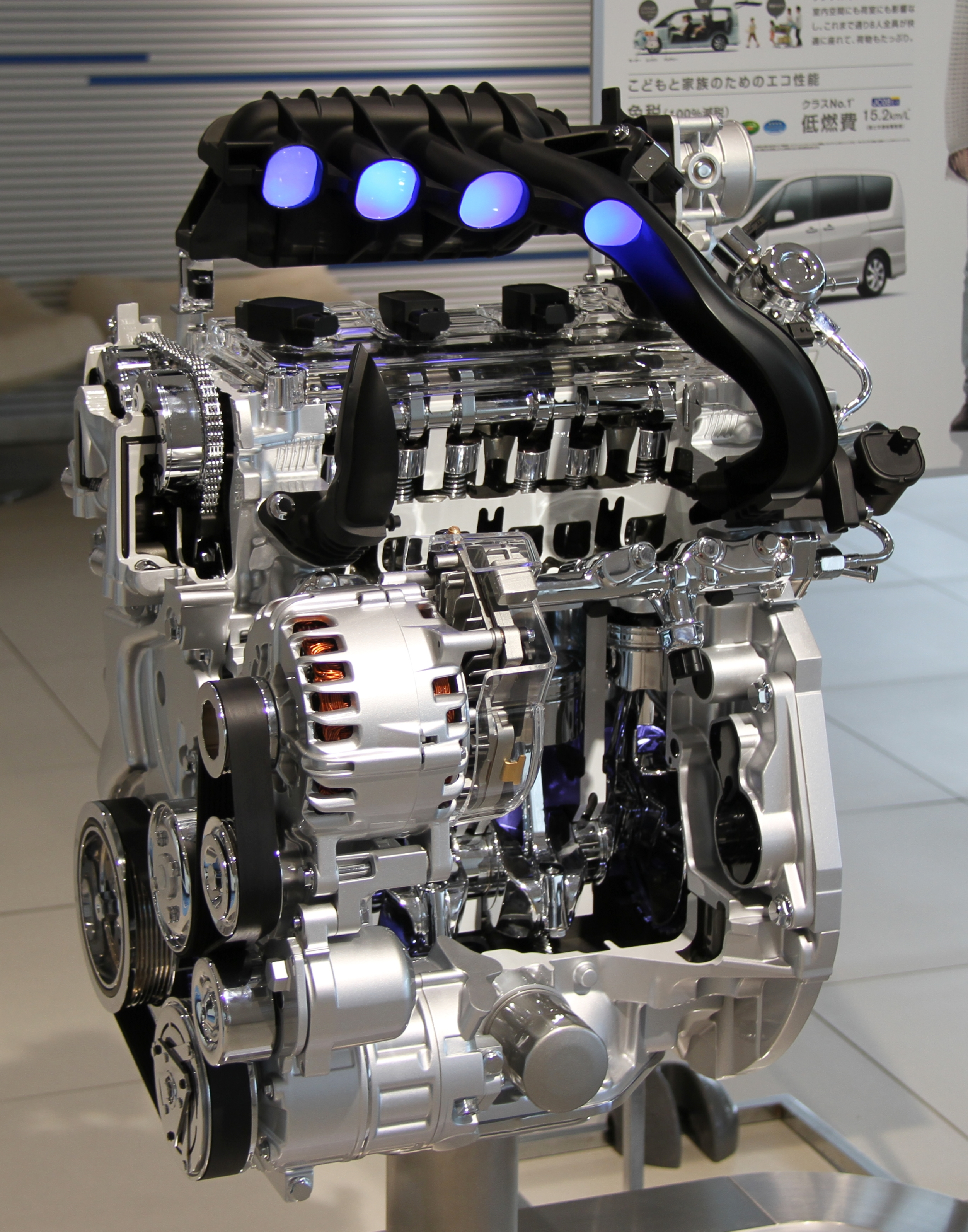 Nissan Serena S-Hybrid